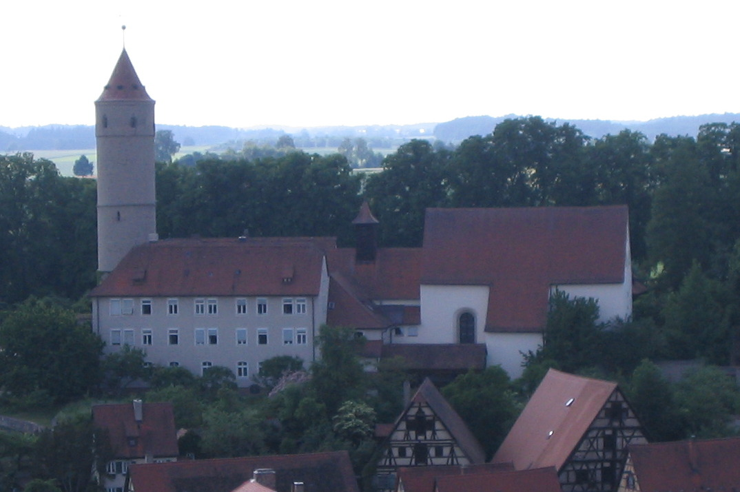 ehem. Kapuzinerklosterkirche Dinkelsbühl